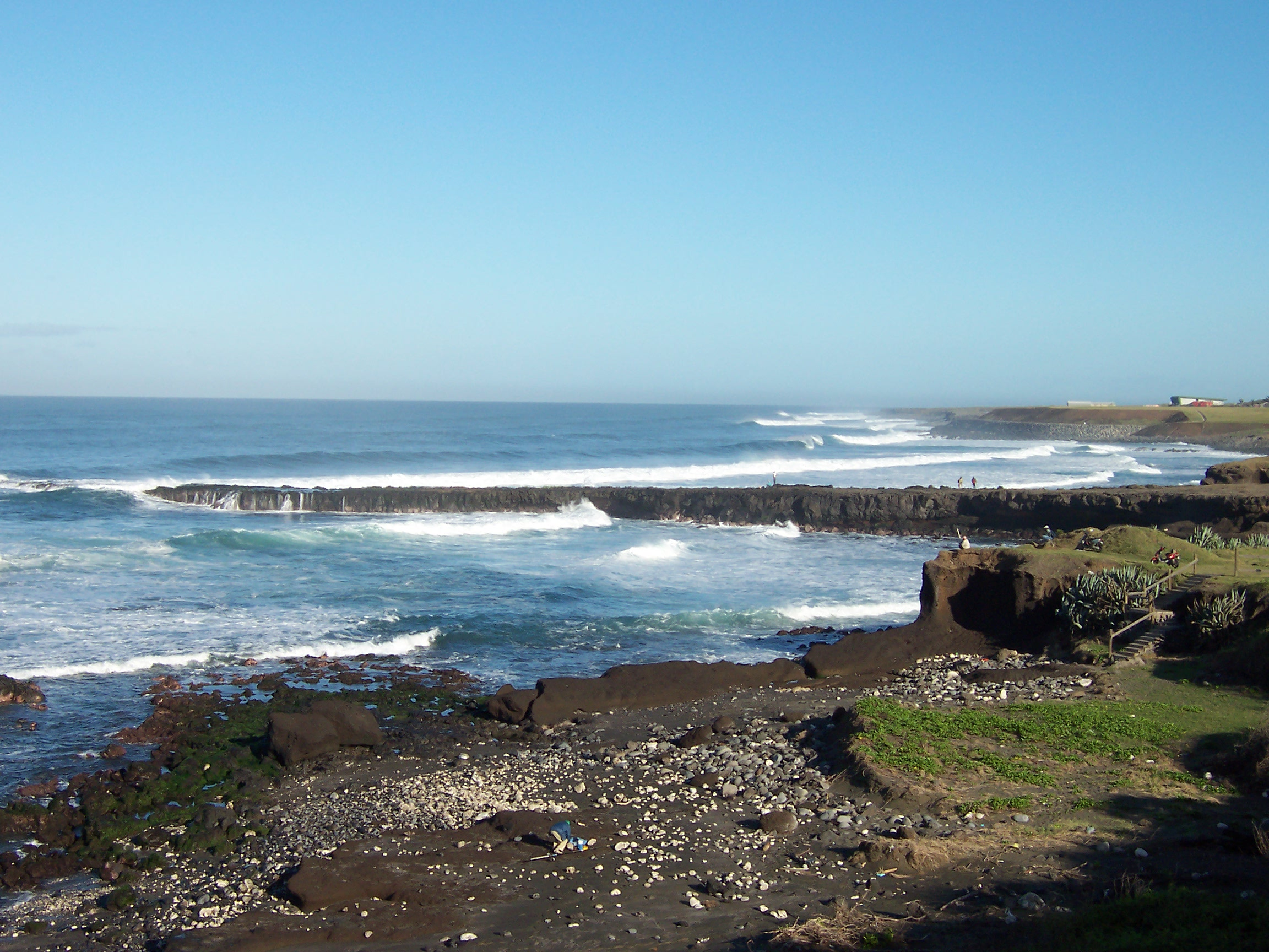 Saint-Pierre (Réunion) : la pointe du Diable, a former basaltic lavaflow entering the ocean